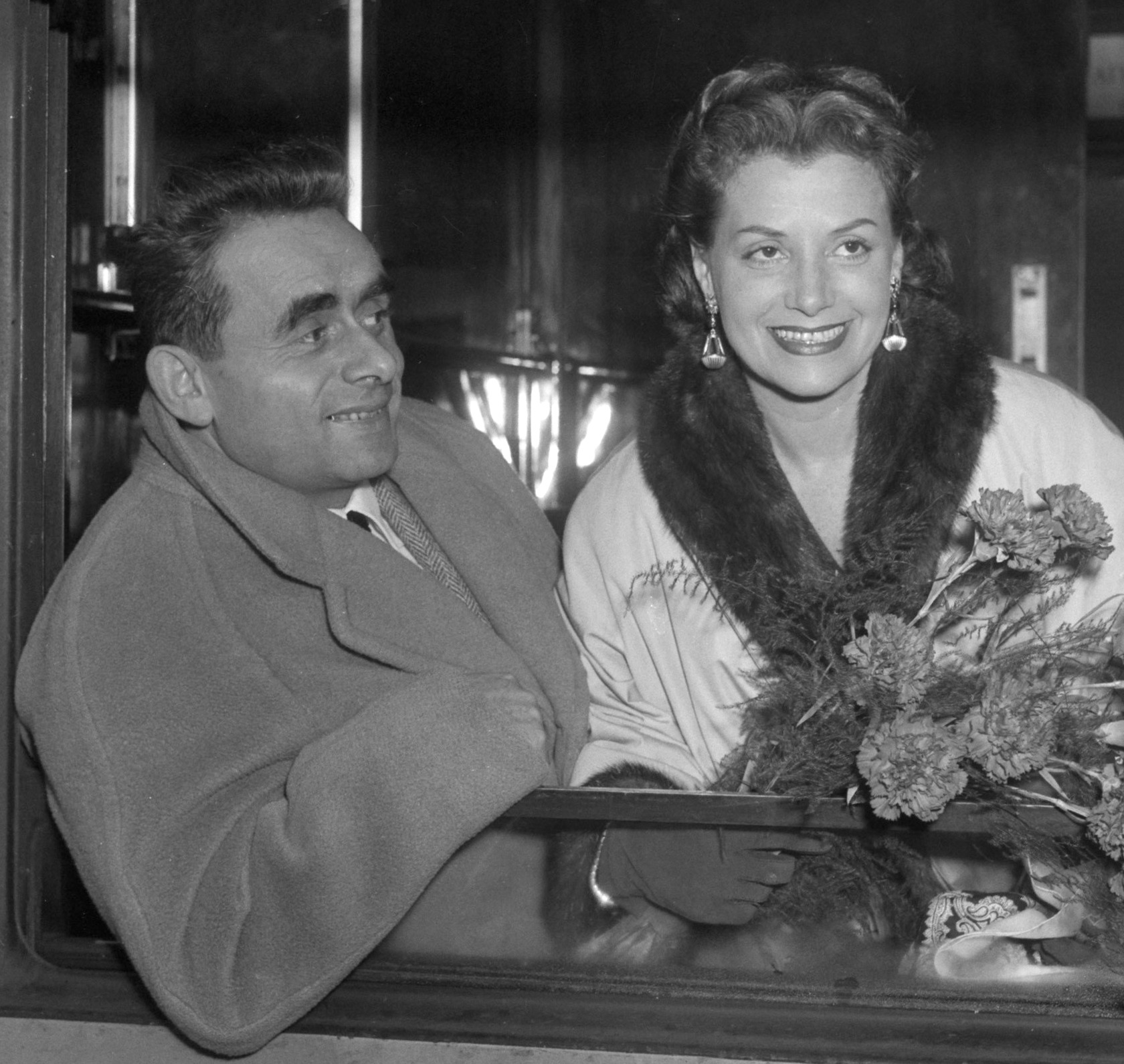 Aankomst op Centraal Station van Henri George Clouzot met zijn vrouw Vera